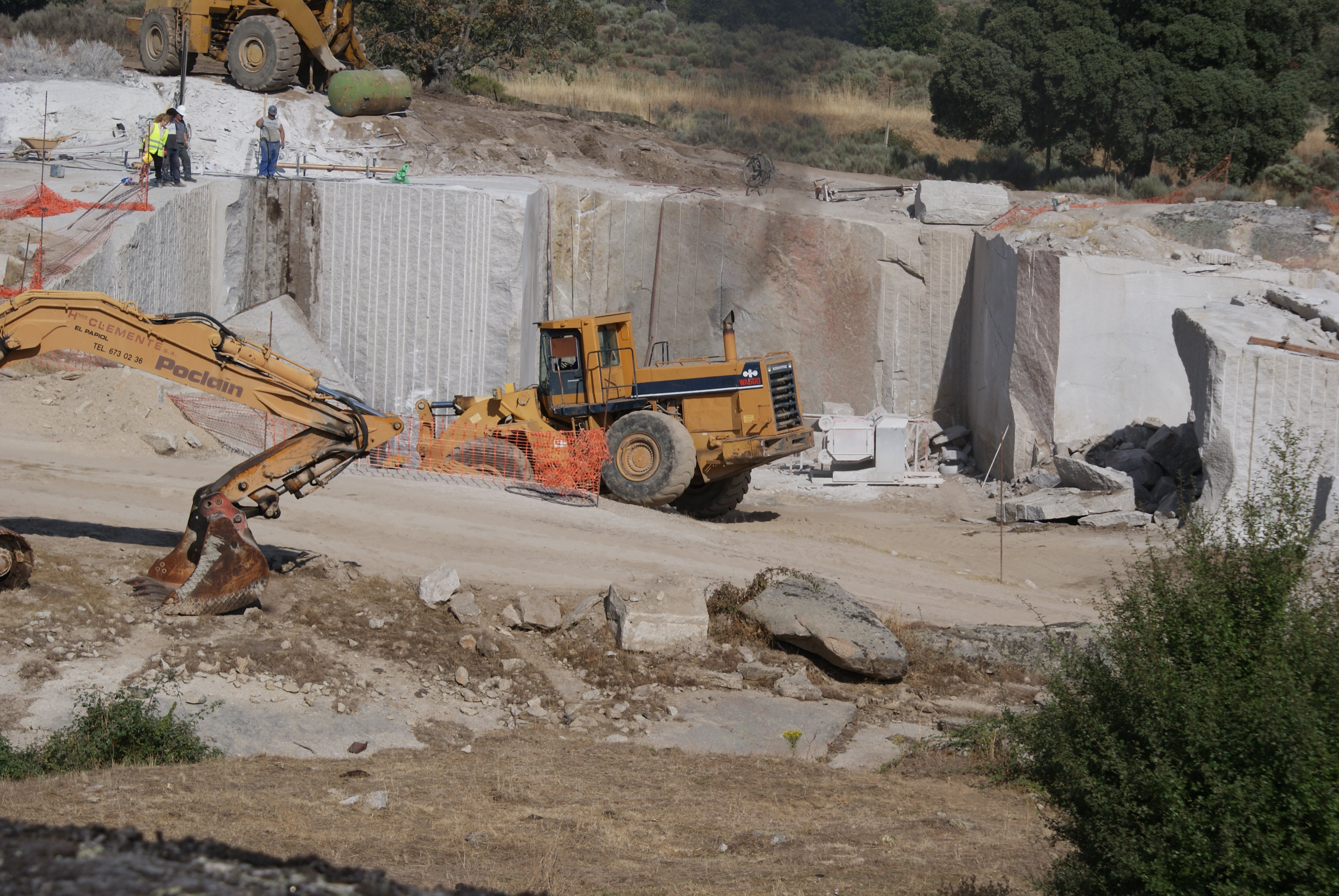 Mina de granito en Villavieja de Yeltes